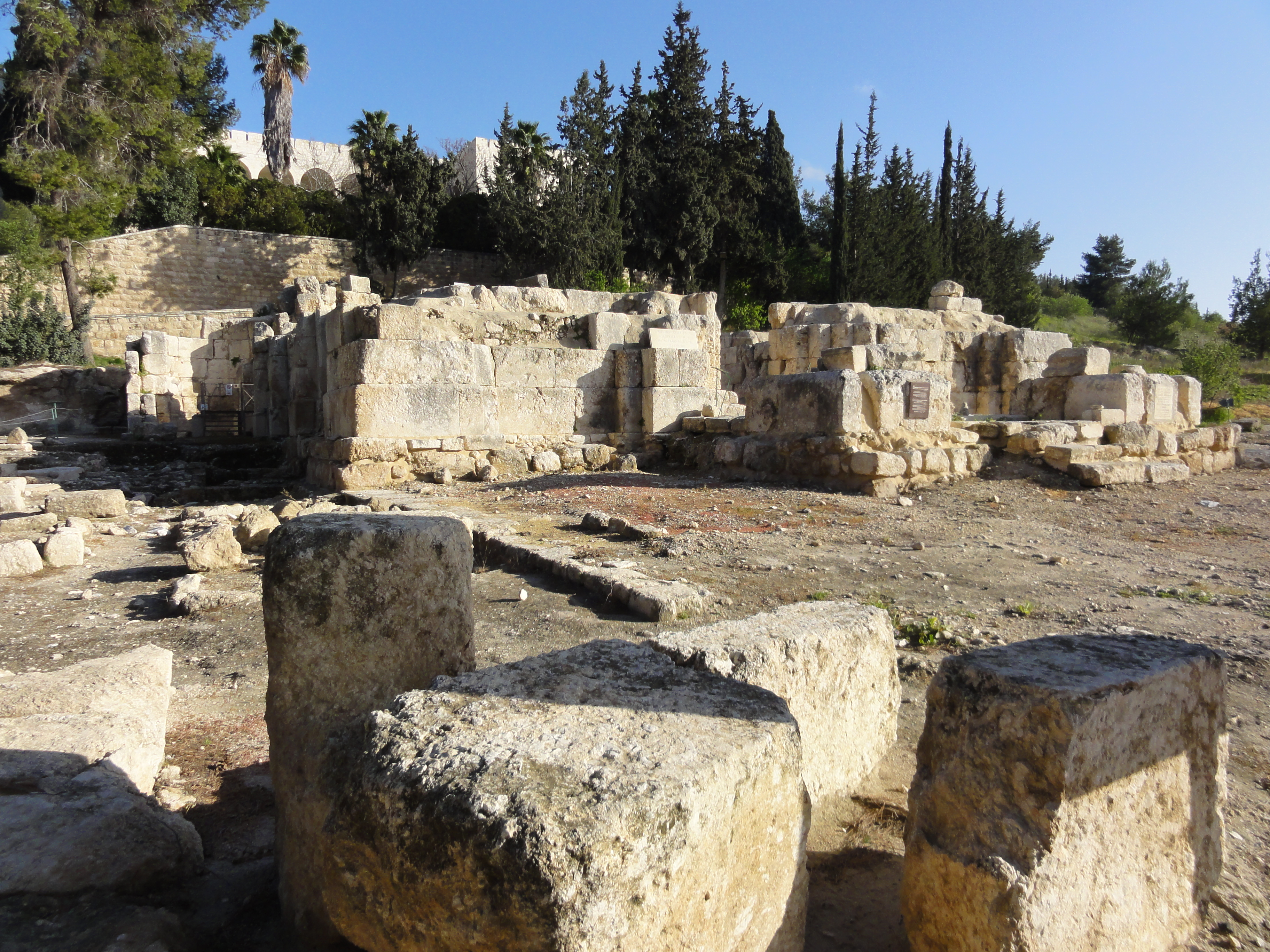 Emmaus Nicopolis